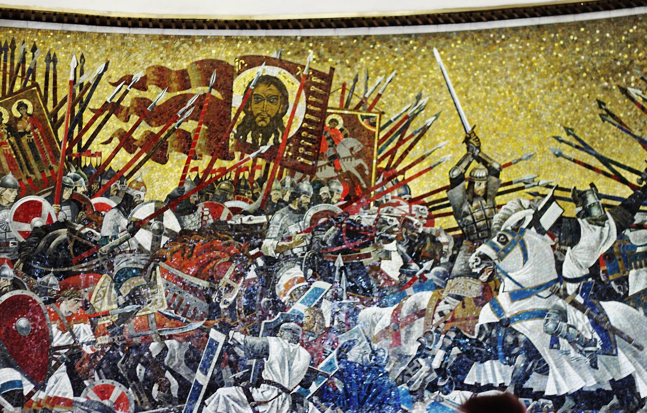 мозаичное панно «Ледовое побоище», выполненное по эскизу художника А. К. Быстрова. А.К.Быстров. Ледовое побоище. Мозаика на станции метро «Площадь Александра Невского» в Ленинграде. 1985